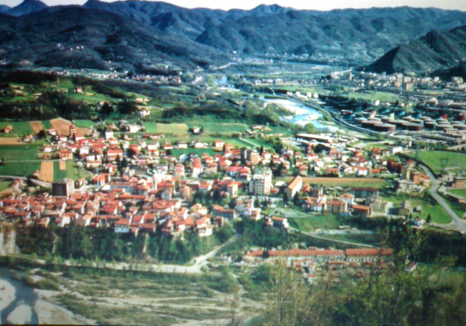 Vignole Borbera (AL) visto da Montespineto (468 m) nel comune di Stazzano